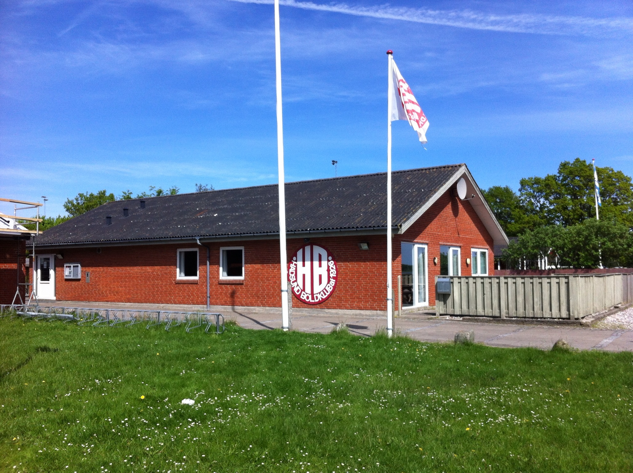 9560 Hadsund på Stadionvej